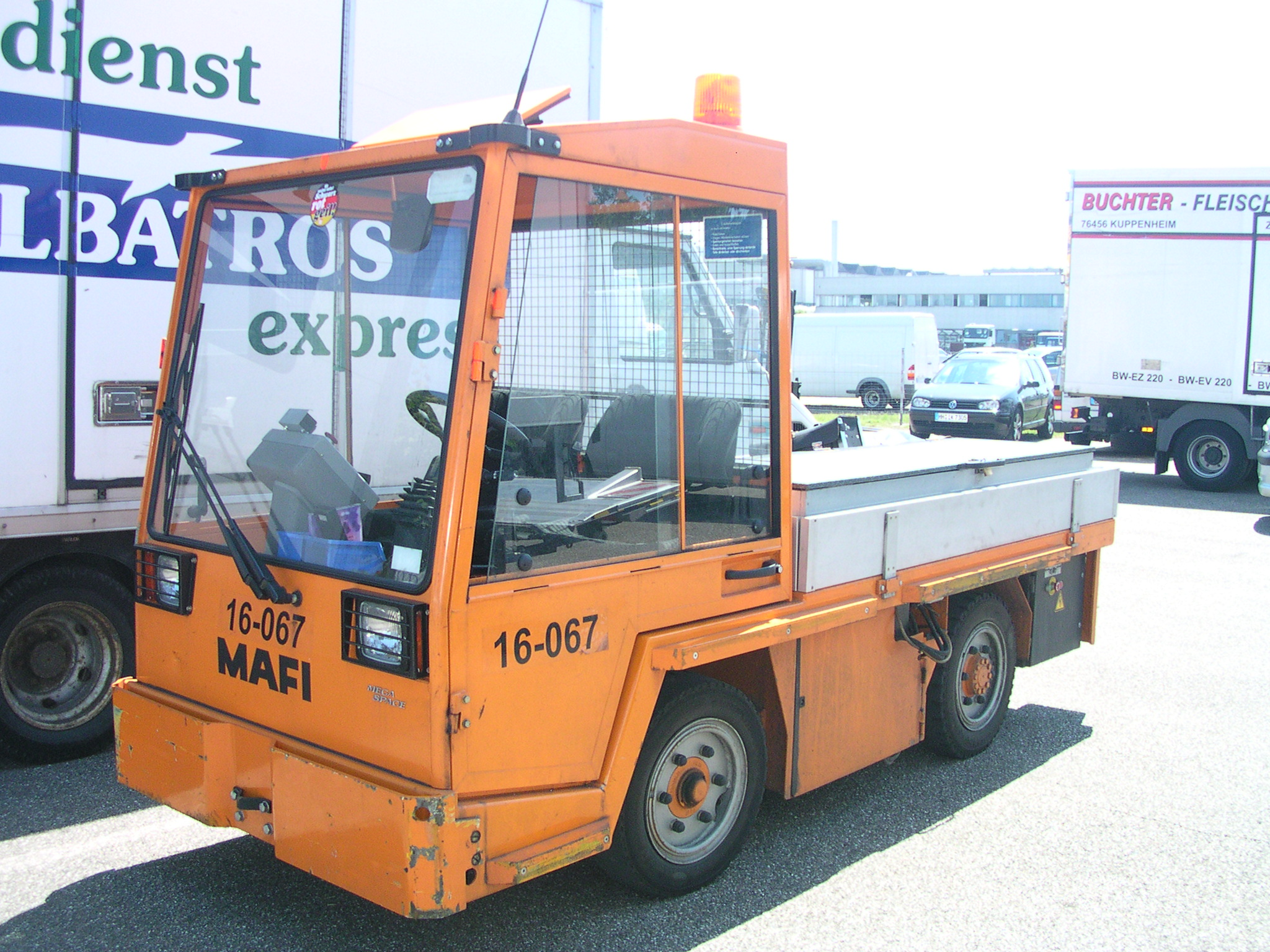 Mafi-Elektrokarre in Wörth am Rhein bei Daimler-Chrysler